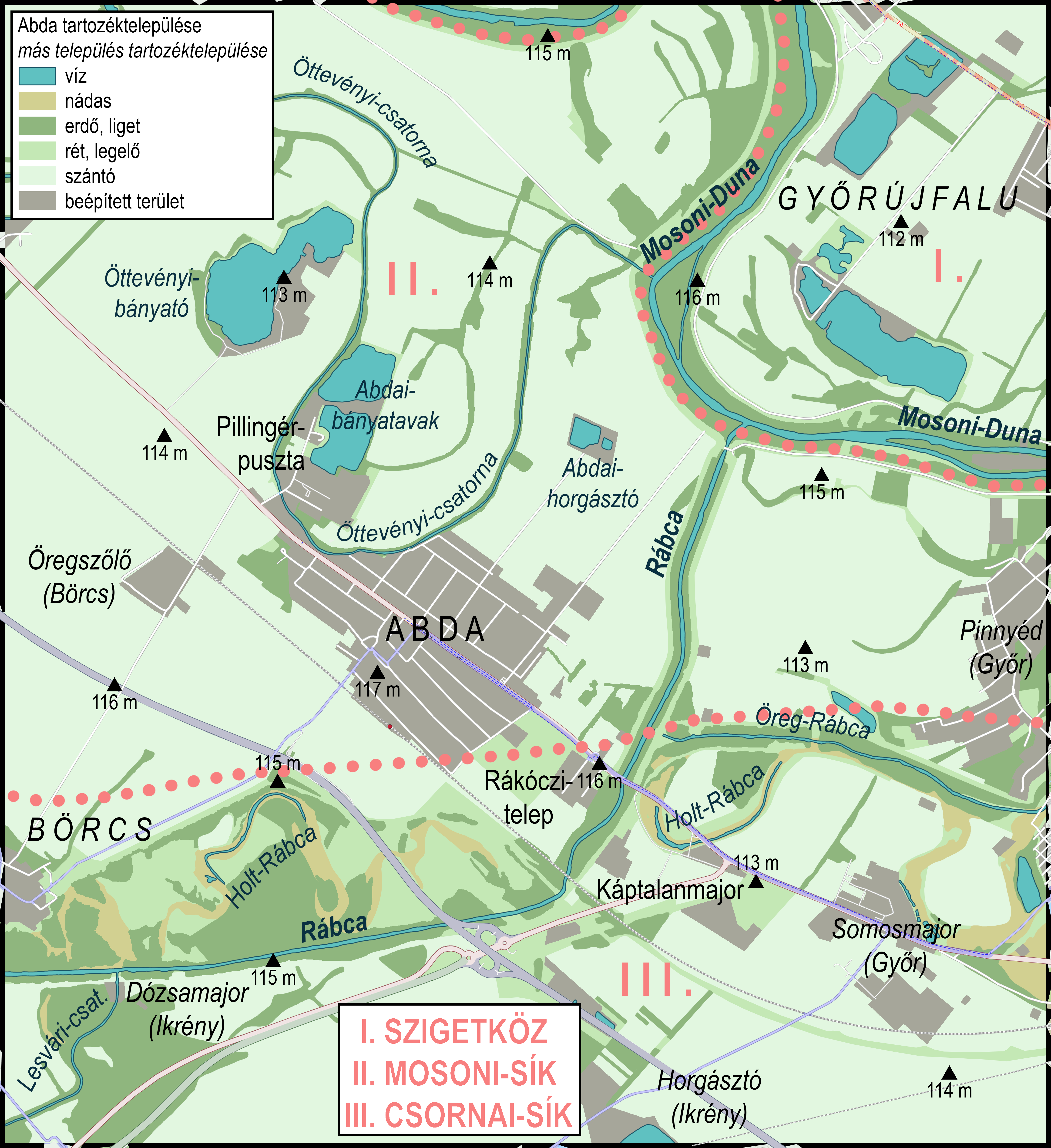 Abda földrajzi környezete az alábbiak felhasználásával: • Open Street Map alaptérkép • Területhasznosítási adatok kiigazítása több napos bejárás során 2020. május–júniusban • Magasságadatok az 1941-es katonai felmérés térképszelvényéről • Kistájhatárok a Dövényi Zoltán szerkesztette Magyarország kistájainak katasztere (Bp., 2010) alapján